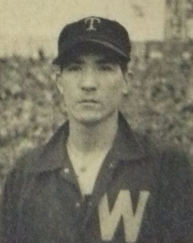 江田貢一